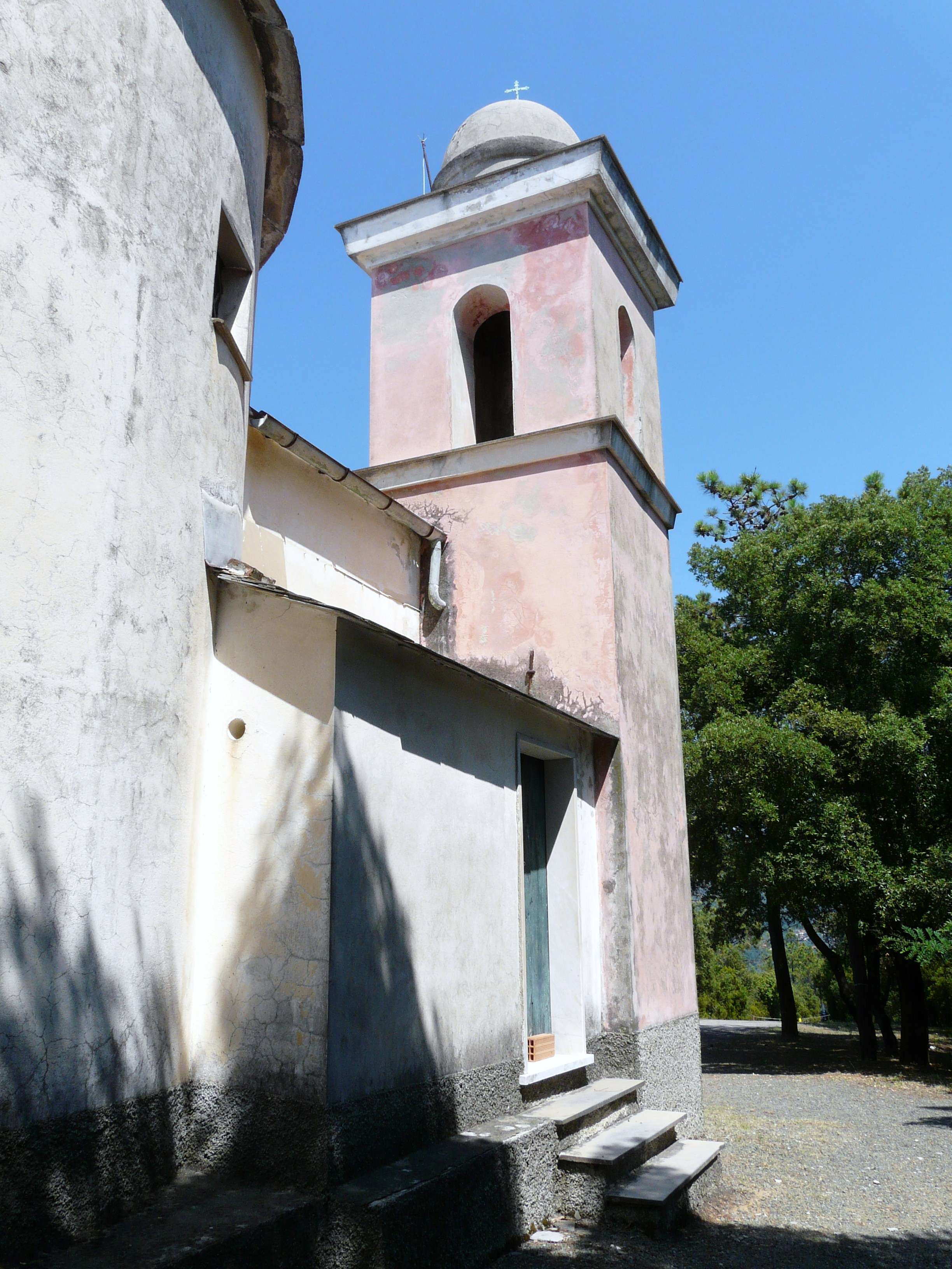 Campanile del Santuario della Madonna di Loreto nella frazione di Masso, Castiglione Chiavarese, Liguria, Italia